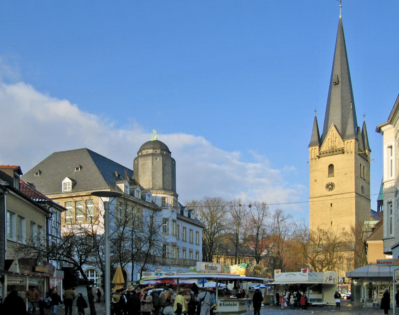 Altes Rathaus (1912) mit Mittelturm und Laubengang mit Rundbögen / St. Vincenz-Kirche (Glockenturm). Erbaut 1345 in gotischem Baustil aus Mendener Bruchstein. 1868 bis 1871 wurde der Hallenbau in spätgotischem Baustil erweitert. Noch heute ist der Kirchturm das höchste Bauwerk in Menden (Sauerland).